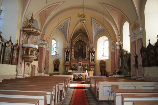 Lubrza – kościół parafialny p.w. św. Jakuba, 1600, XVIII w. (zabytek nr 567/59 z 3.04.1959)